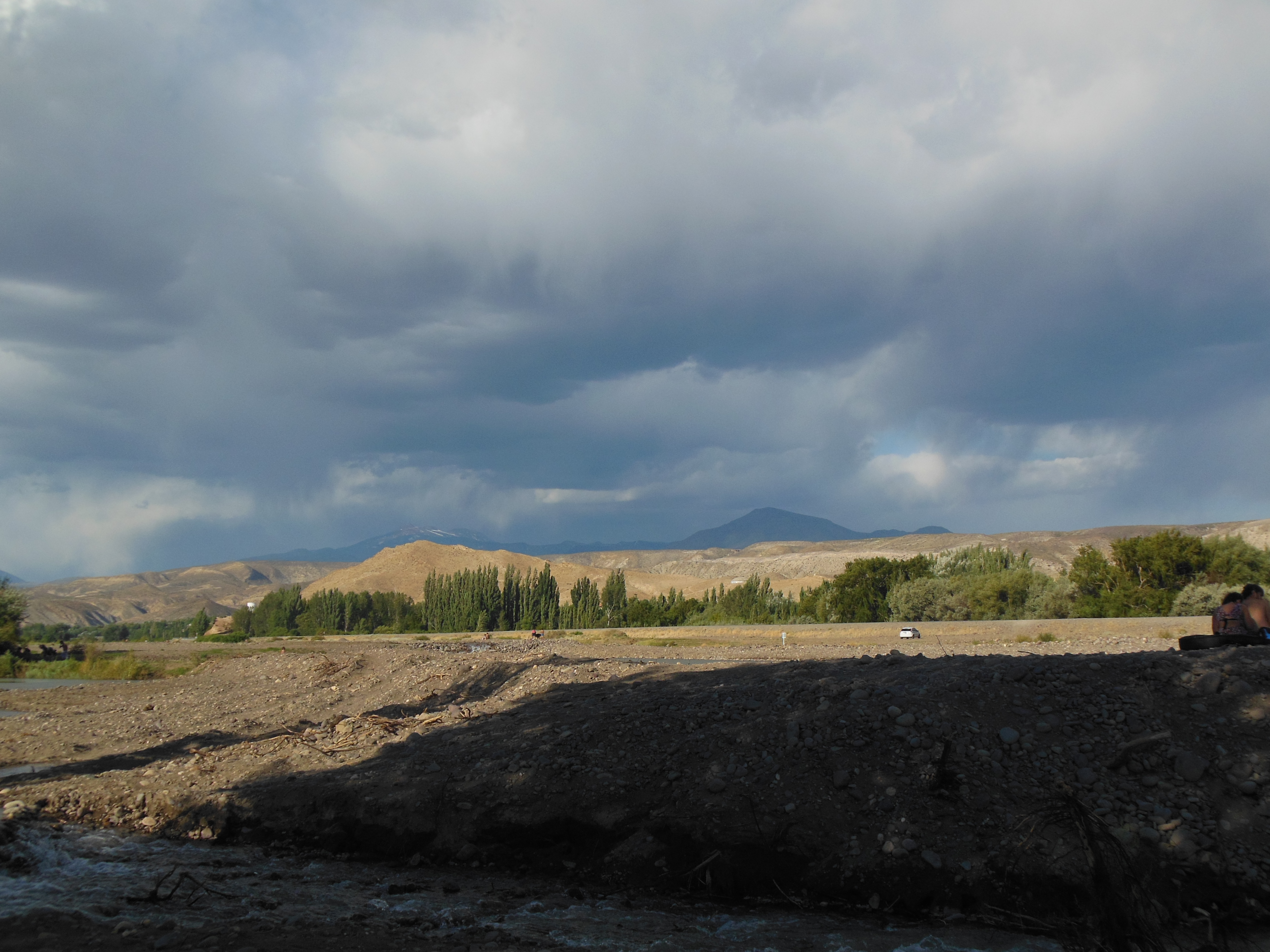 Imagen familiar tomada sobre el cauce el Río Curileuvú en el mes de enero de 2014, en Chos Malal, Neuquén, Argentina.